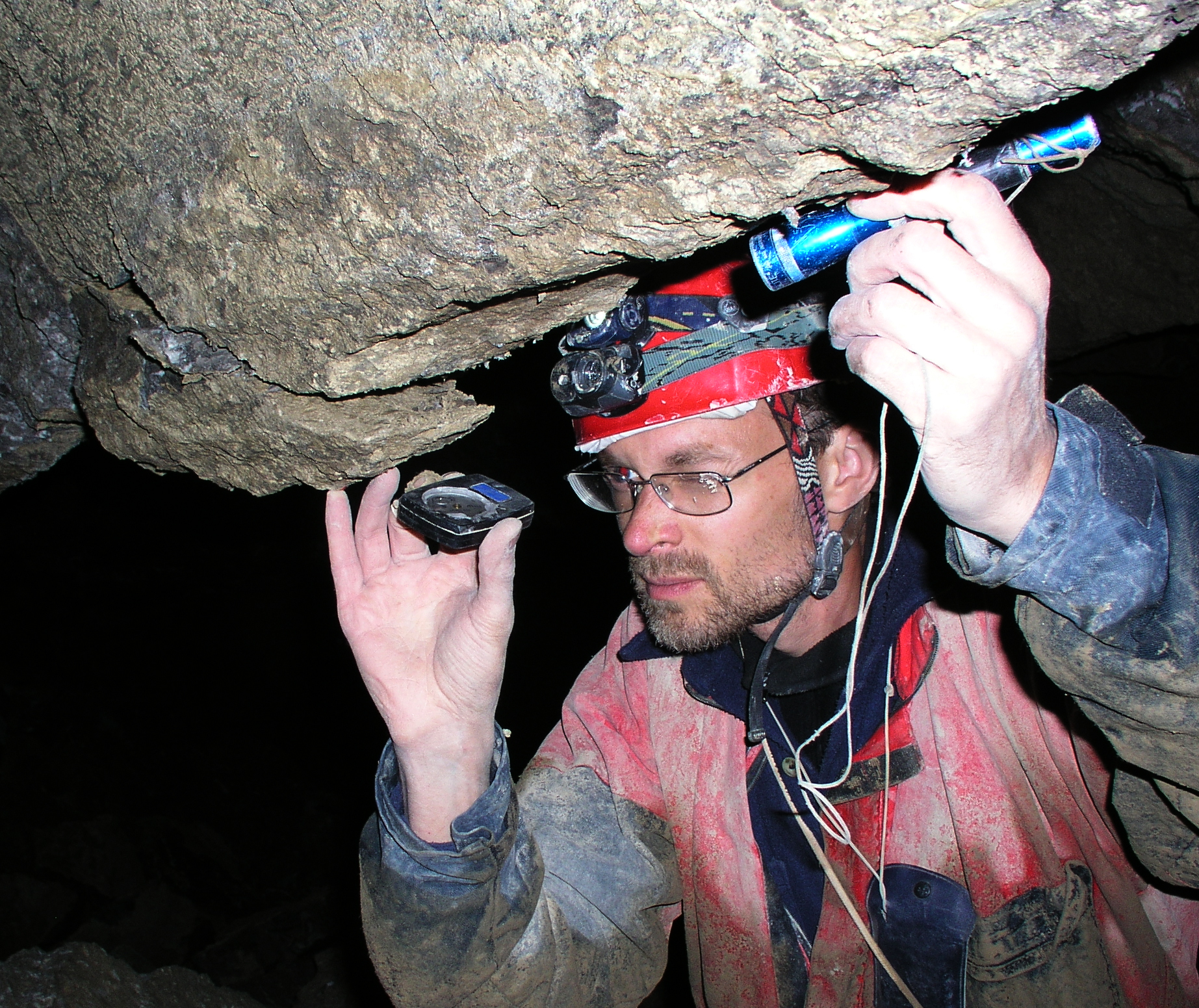 Topographie spéléologique dans la galerie des Hormones de la grotte des Chamois.